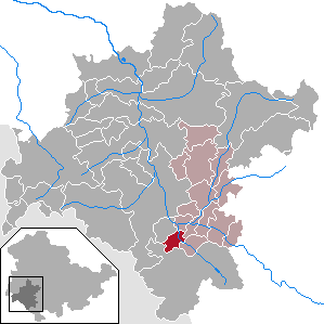 Ritschenhausen in Thuringia - District Schmalkalden-Meiningen